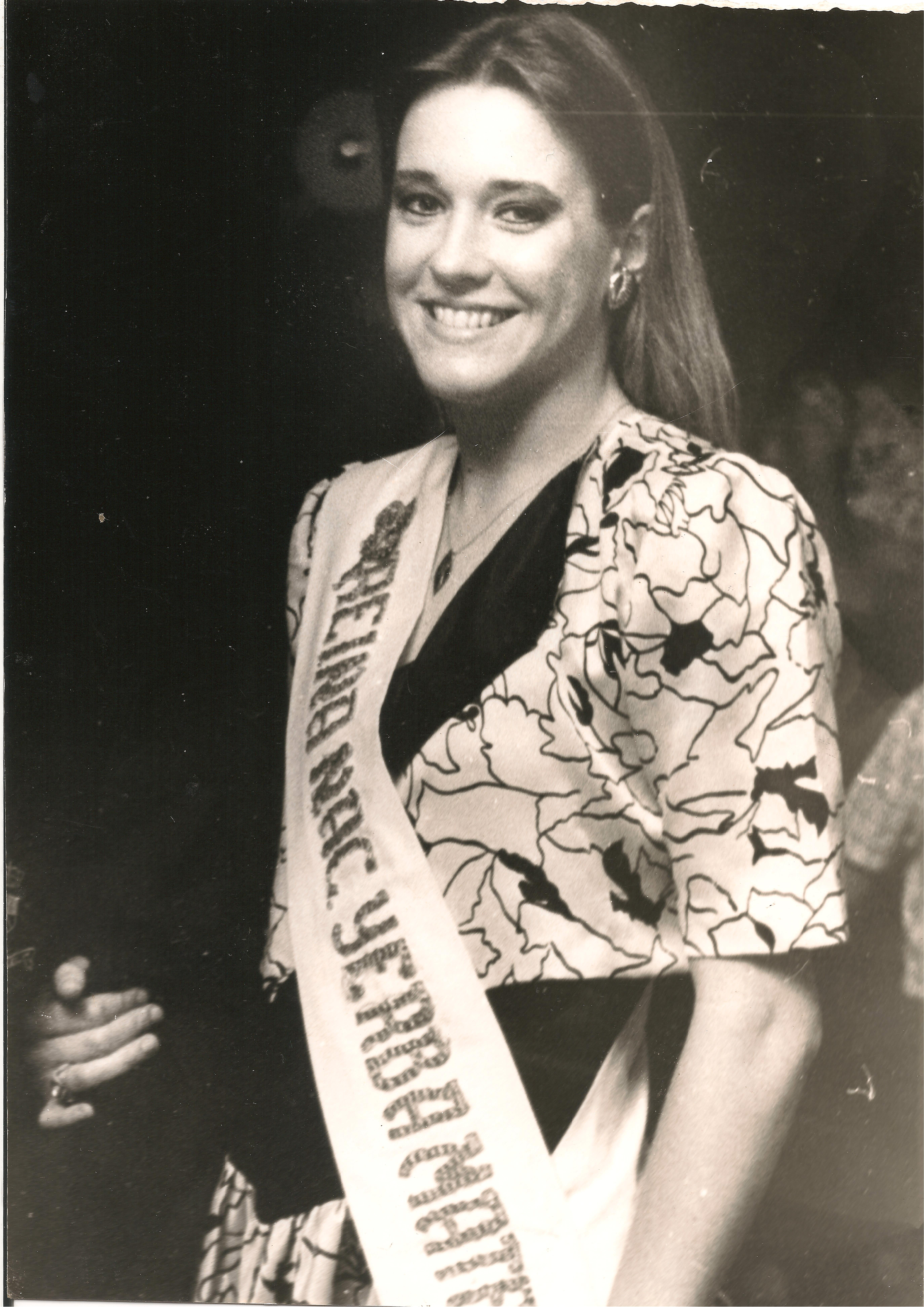 Roxana Andrea Atamaniuk - Reina Nacional de la Yerba Mate 1990. Apóstoles, Provincia de Misiones, Argentina.